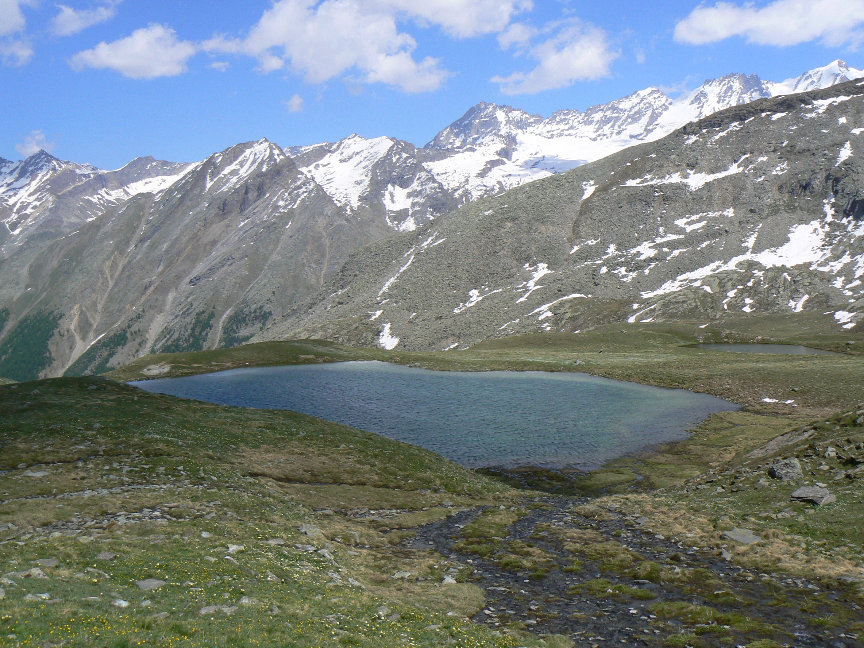 Laghi Djouan, in Valsavarenche, Parco nazionale Gran Paradiso. Comune di Valsavarenche, Valle d'Aosta, Italia. This is a photo of a monument which is part of cultural heritage of Italy.